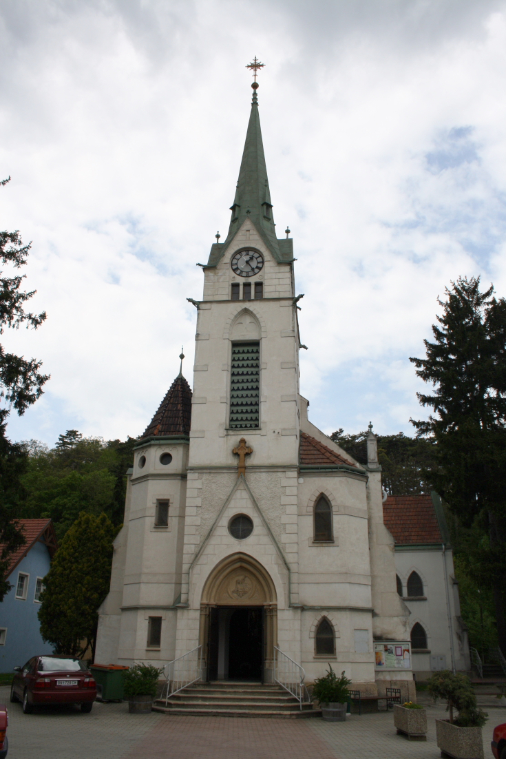 Pfarrkirche der niederösterreichischen Gemeinde Hirtenberg.